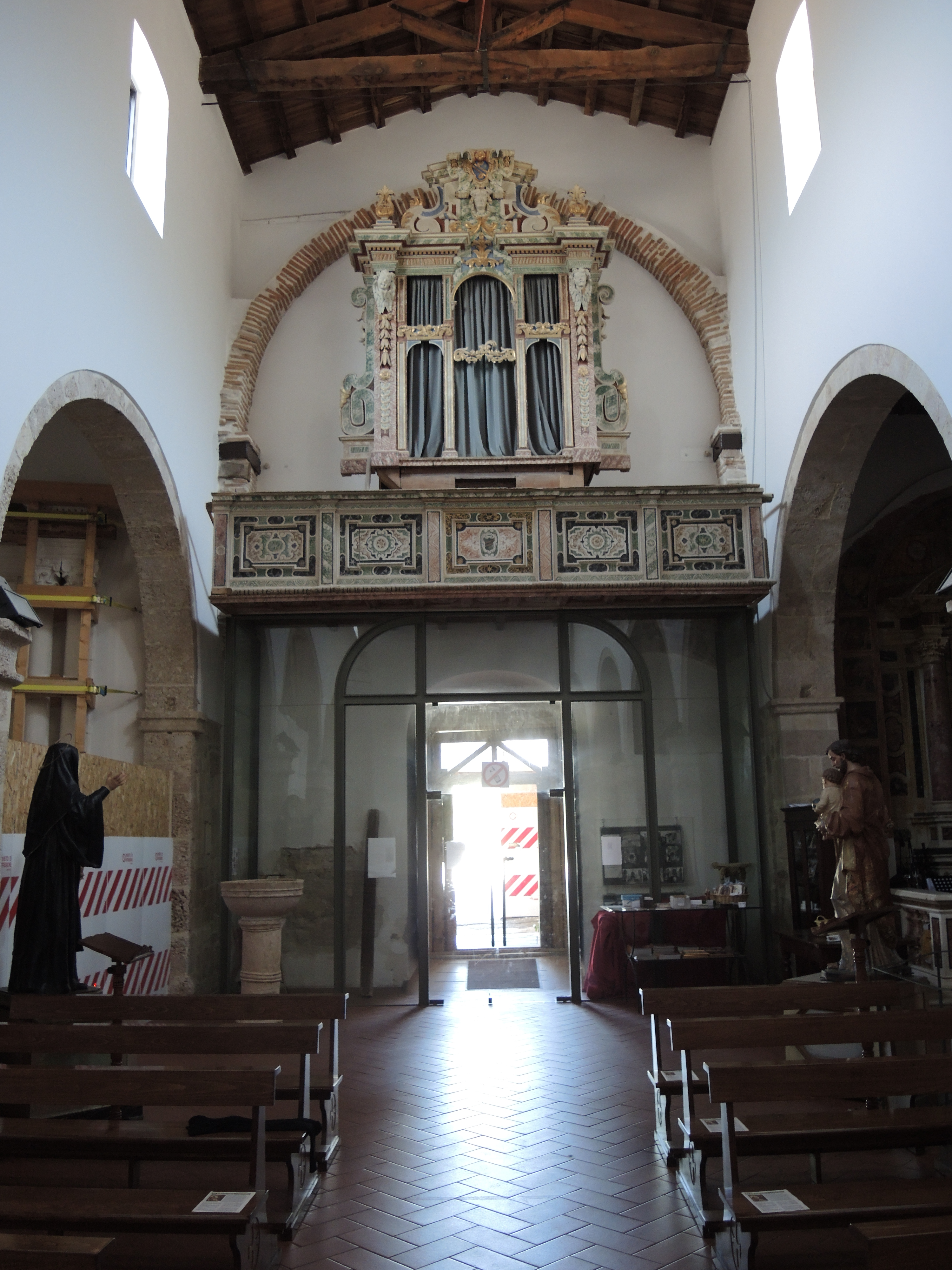 Lucoli: Abbazia di San Giovanni Battista